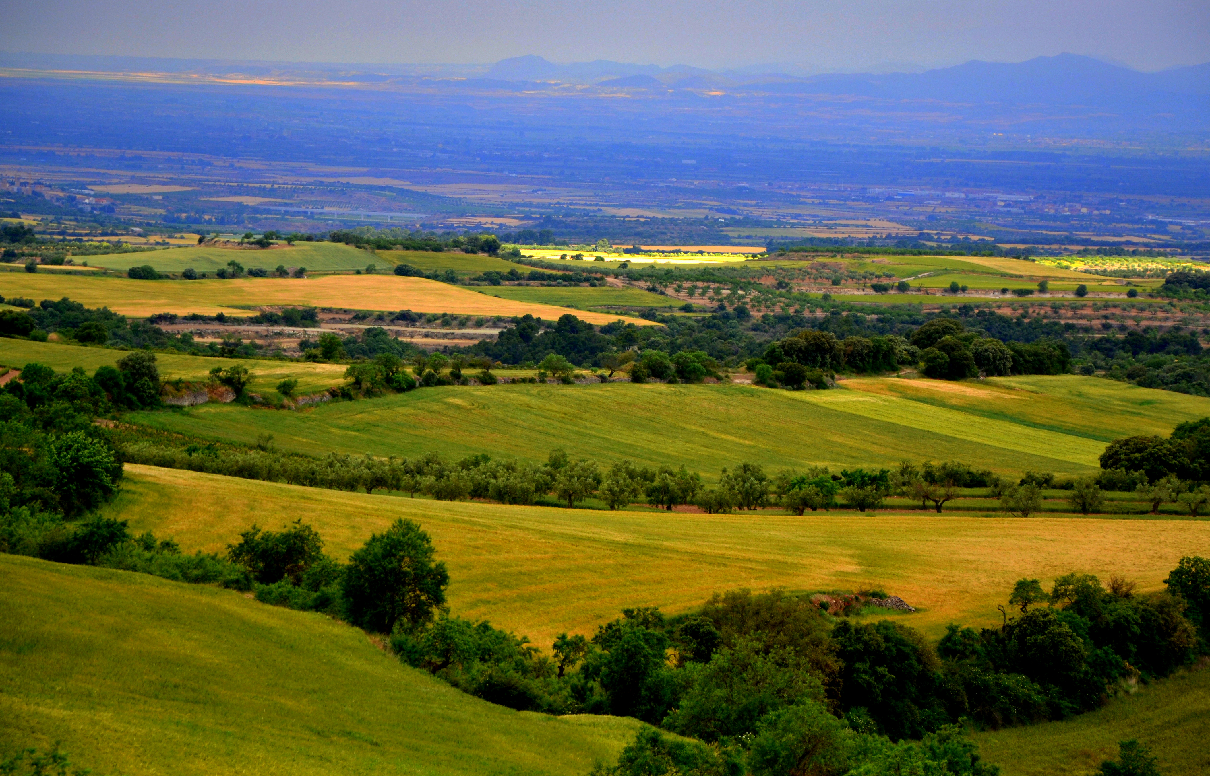 Granyena This is a a photo of a natural area in Catalonia, Spain, with id: ES510254